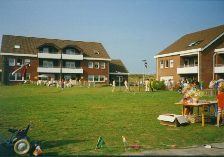 Ansicht Benekstr. Inselinternat Anfang 2000